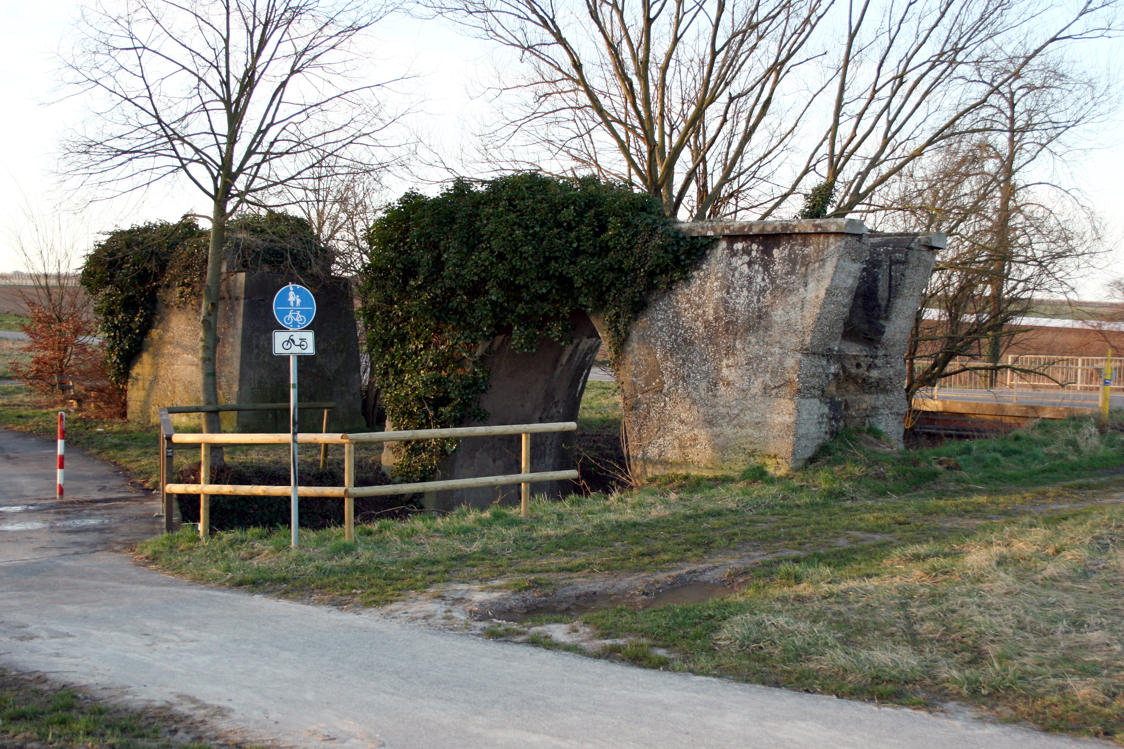 Viadukt, Überrest der Lokalbahn Neustadt-Speyer ("Pfefferminzbähnel") bei Freisbach, Lkr. Germersheim.